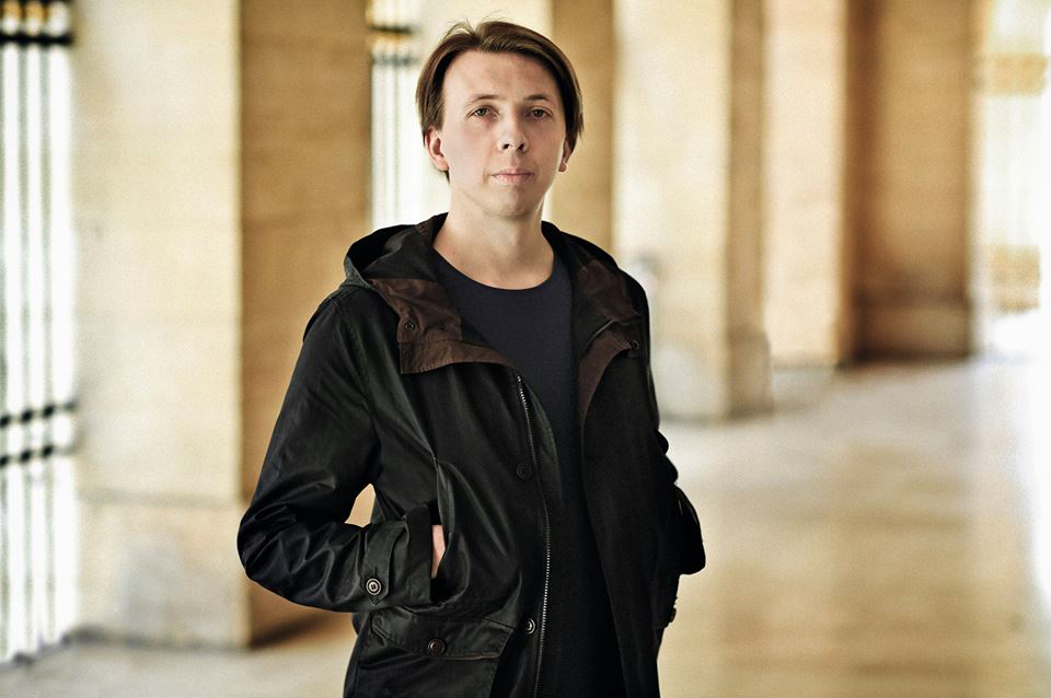 Markiyan Kamysh